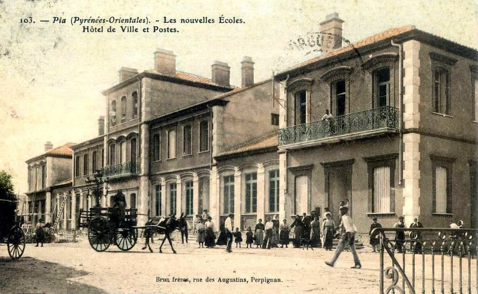 La mairie, les écoles et la poste à Pia au début du 20ème siècle